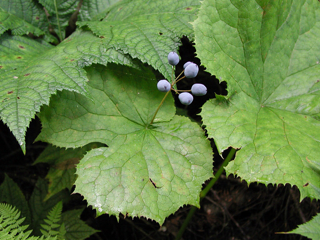 サンカヨウの実（群馬県尾瀬ヶ原で撮影)Diphylleia grayi, (Ozegahara, Gunma, JAPAN)